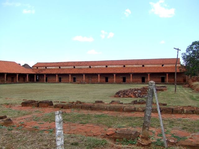 Colegio en las reducciones de San Cosme y Damián, Departamento de Itapúa, Paraguay.